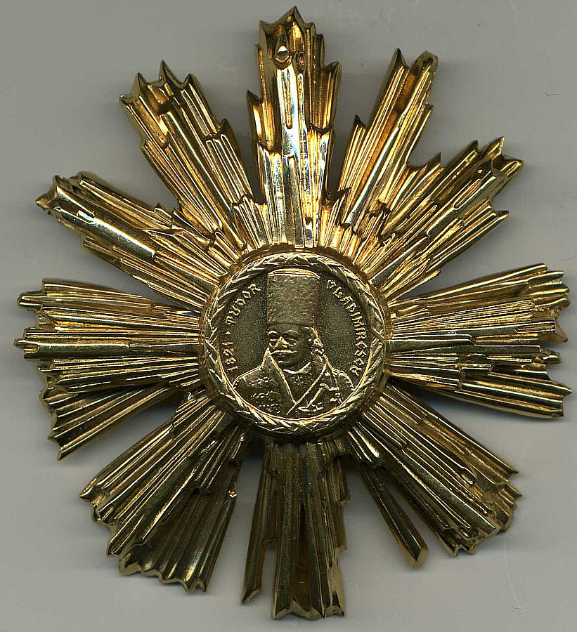 Орден Тудора Владимиреску 2 степени